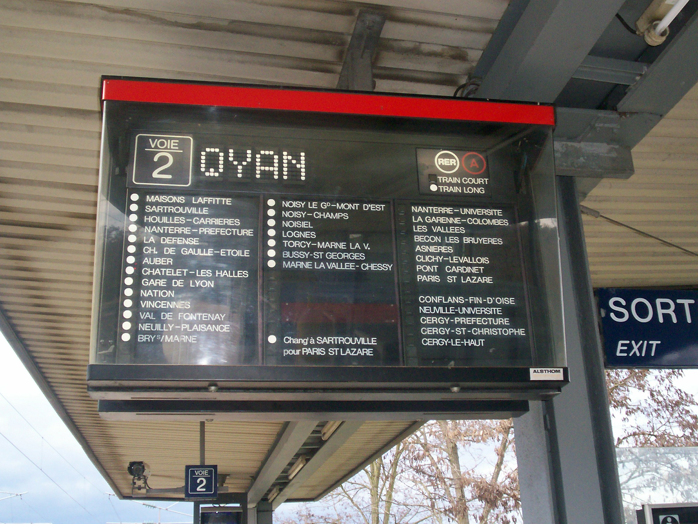 Gare d'Achères-Ville